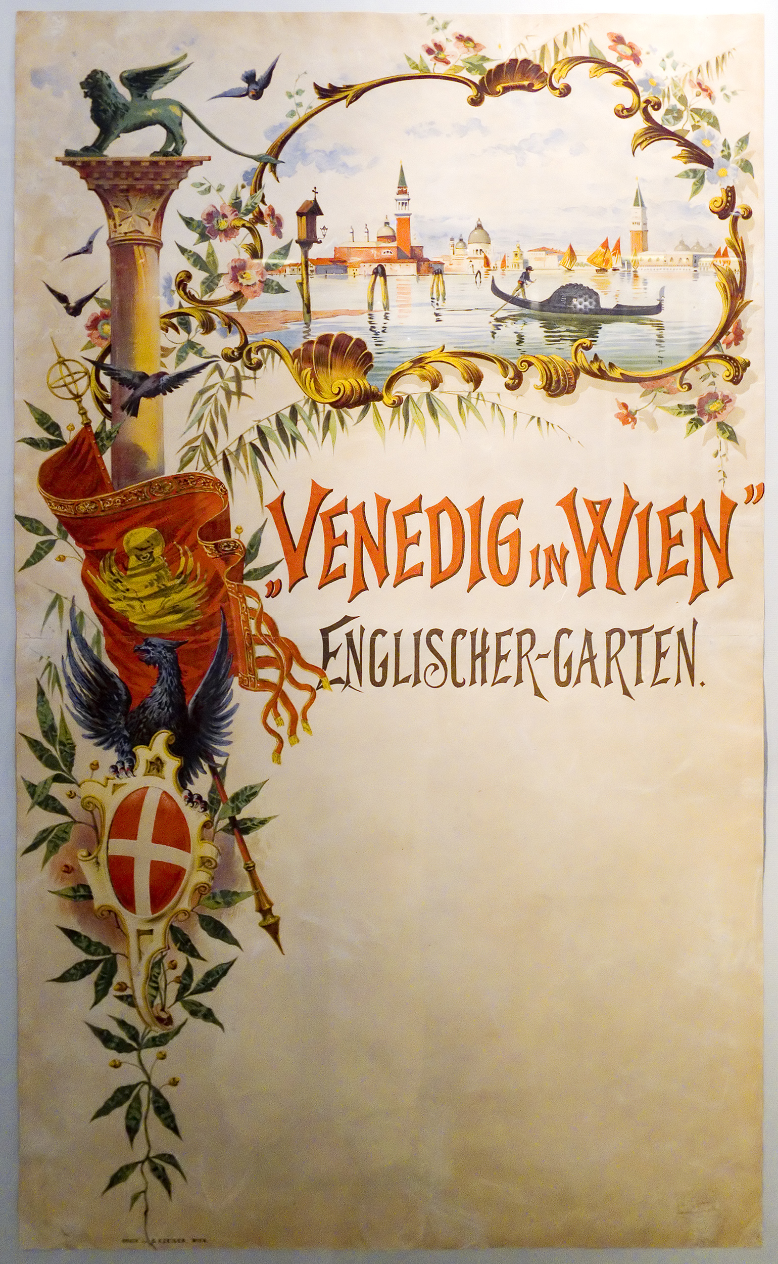 Plakat der Ausstellung Venedig in Wien im Prater, Wien 2